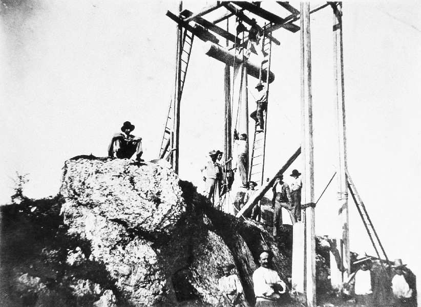 La prima Croce monumentale sul Montescudo. Archivio comunale.